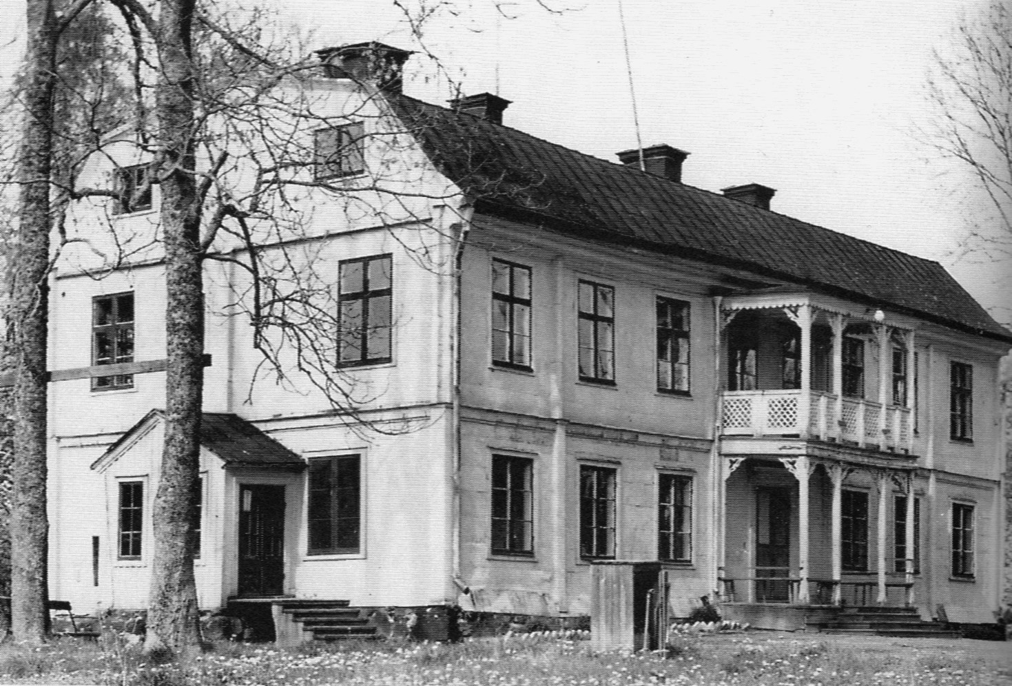 Lissma gårds huvudbyggnad eldades upp 1969